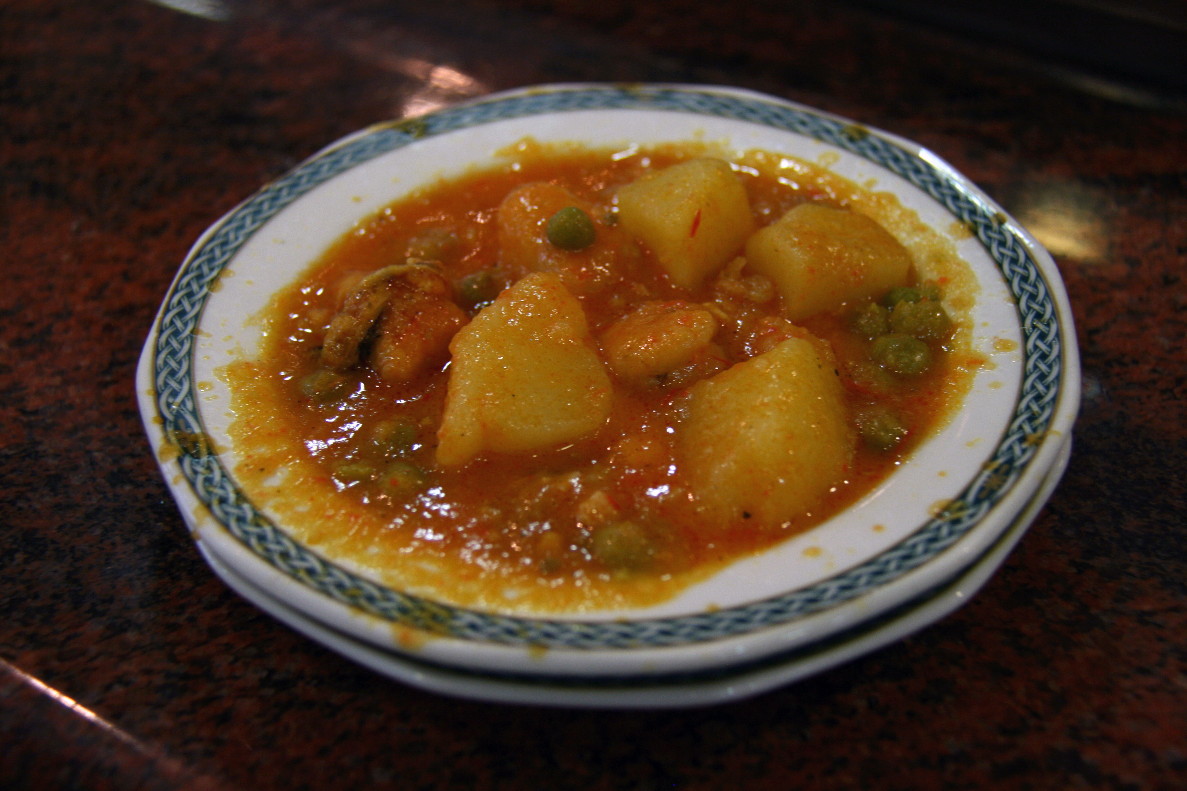 Tapa de un estofado de caldo marinero con pescado y patatas